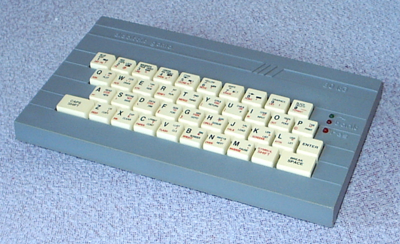 Mikropočítač Didaktik Gama verze 1989